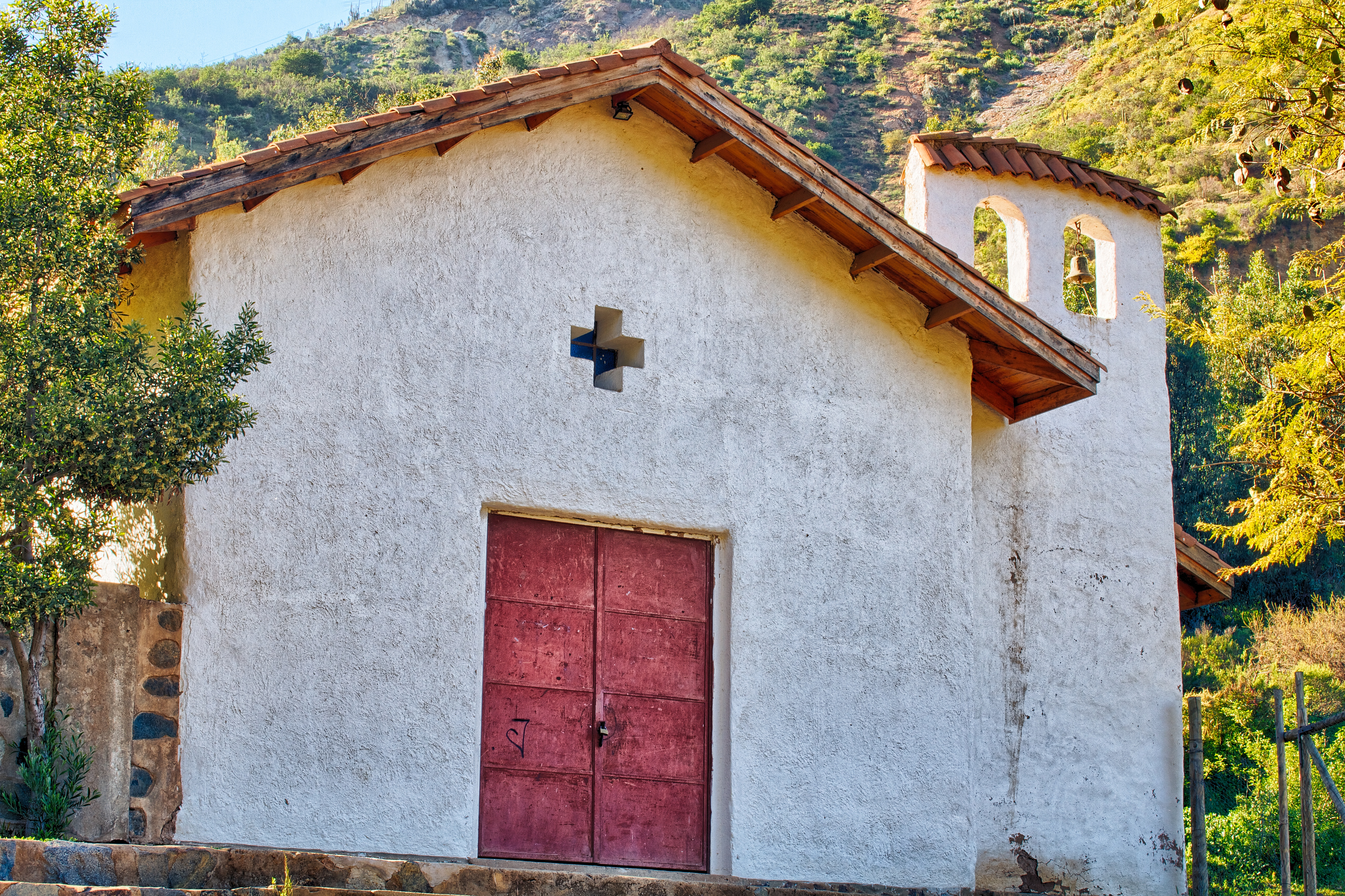 Capilla La Dormida - Olmué This is a photo of a national monument in Chile: 758